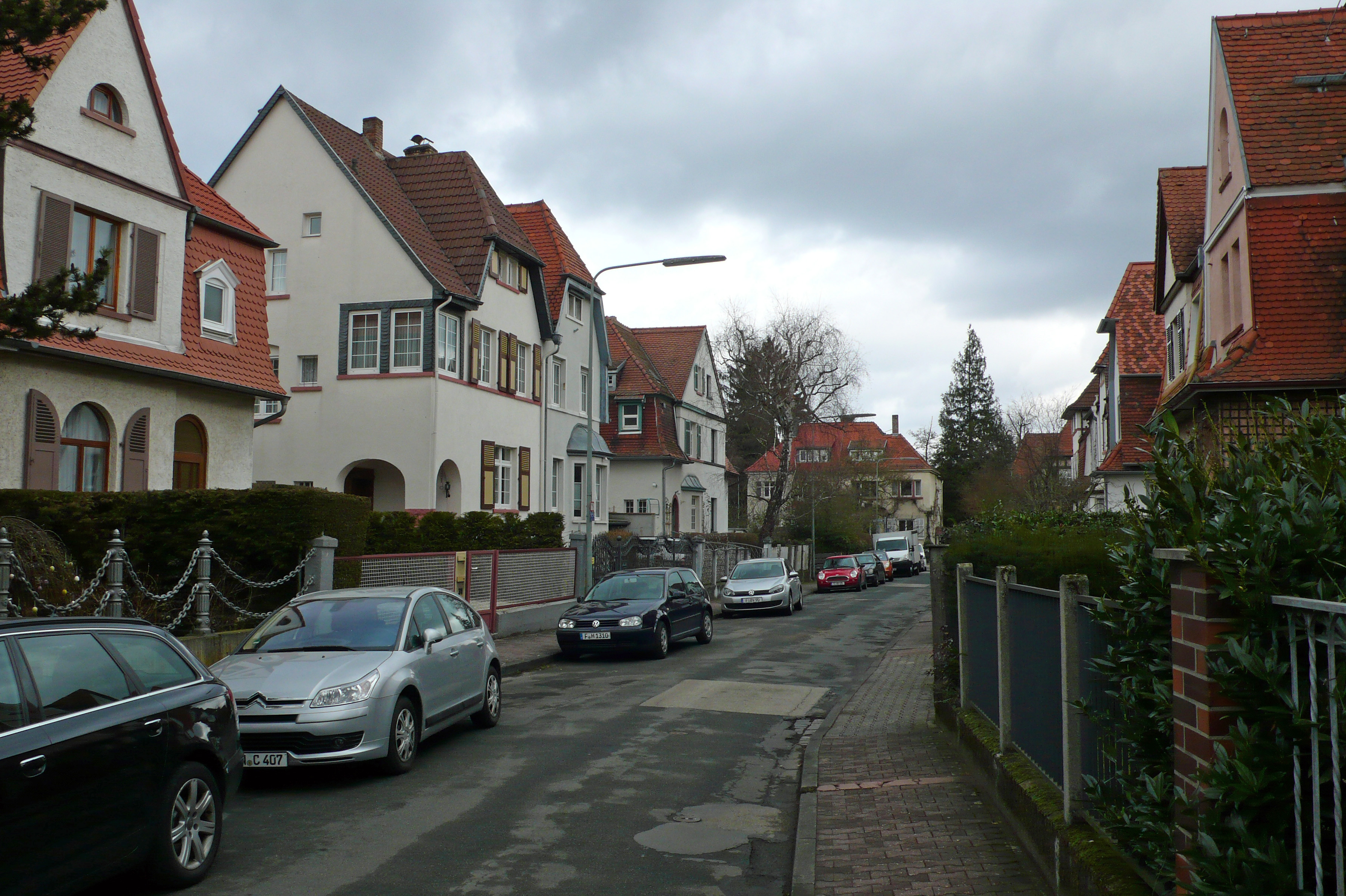 Blick in der Goldgrubenstraße nach Norden